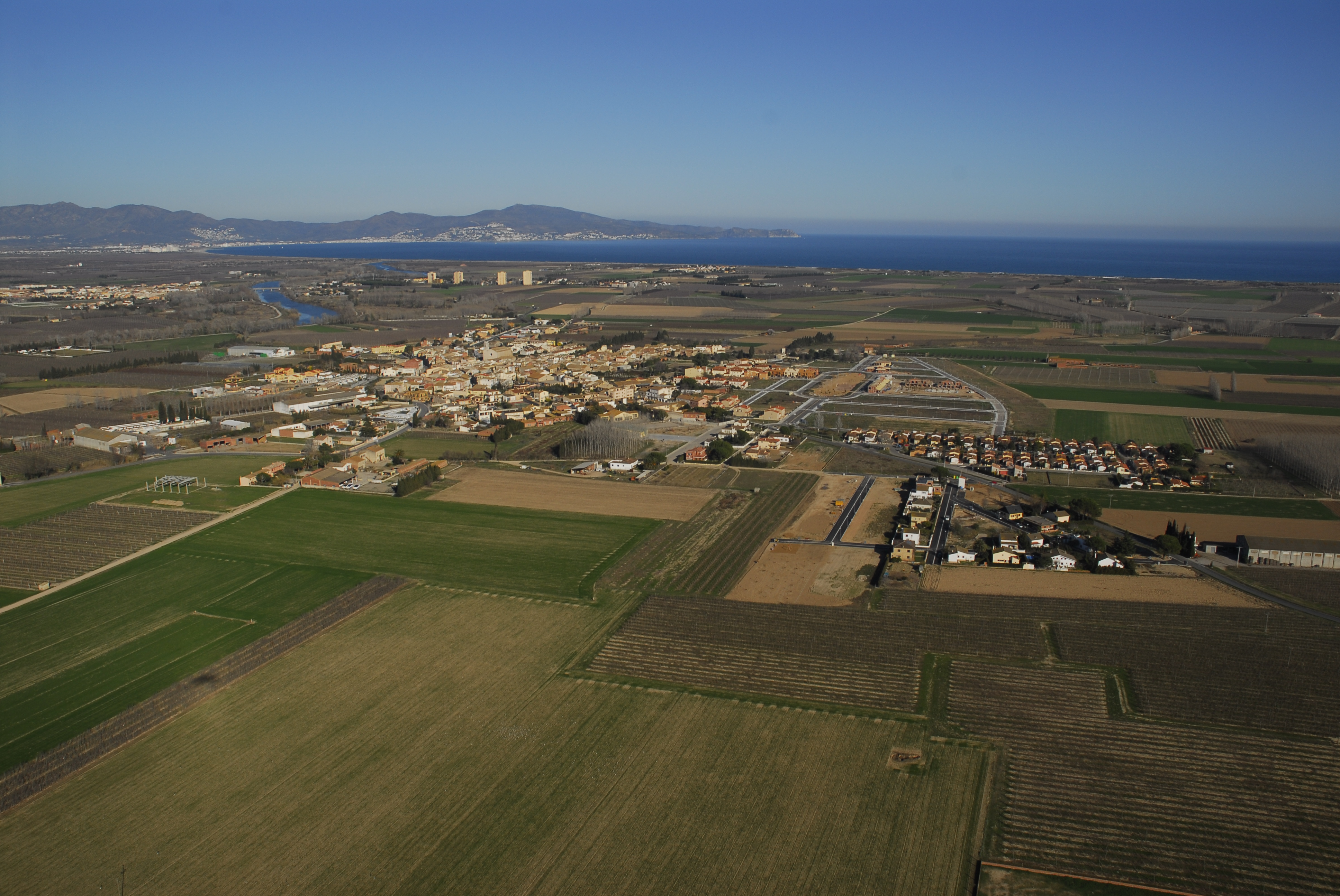 Fotografia del terme de l'Armentera